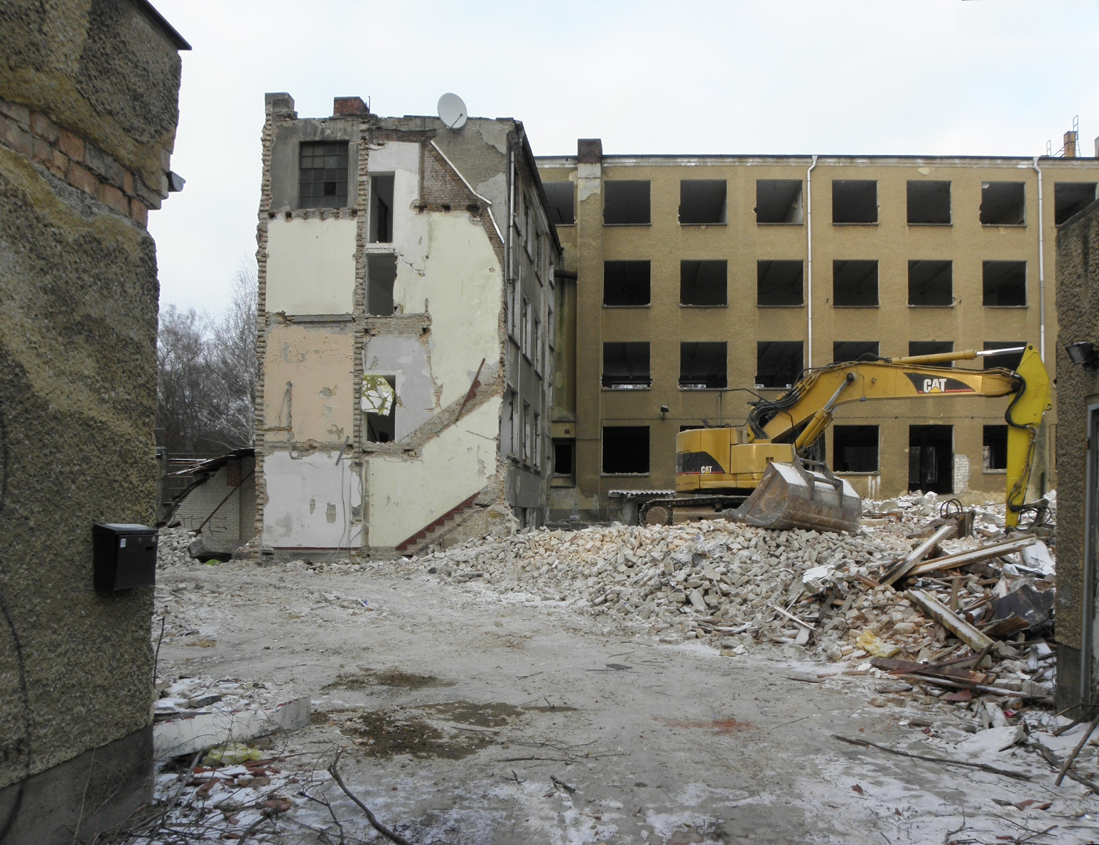 Historisches Postamt Lichtenberg 1